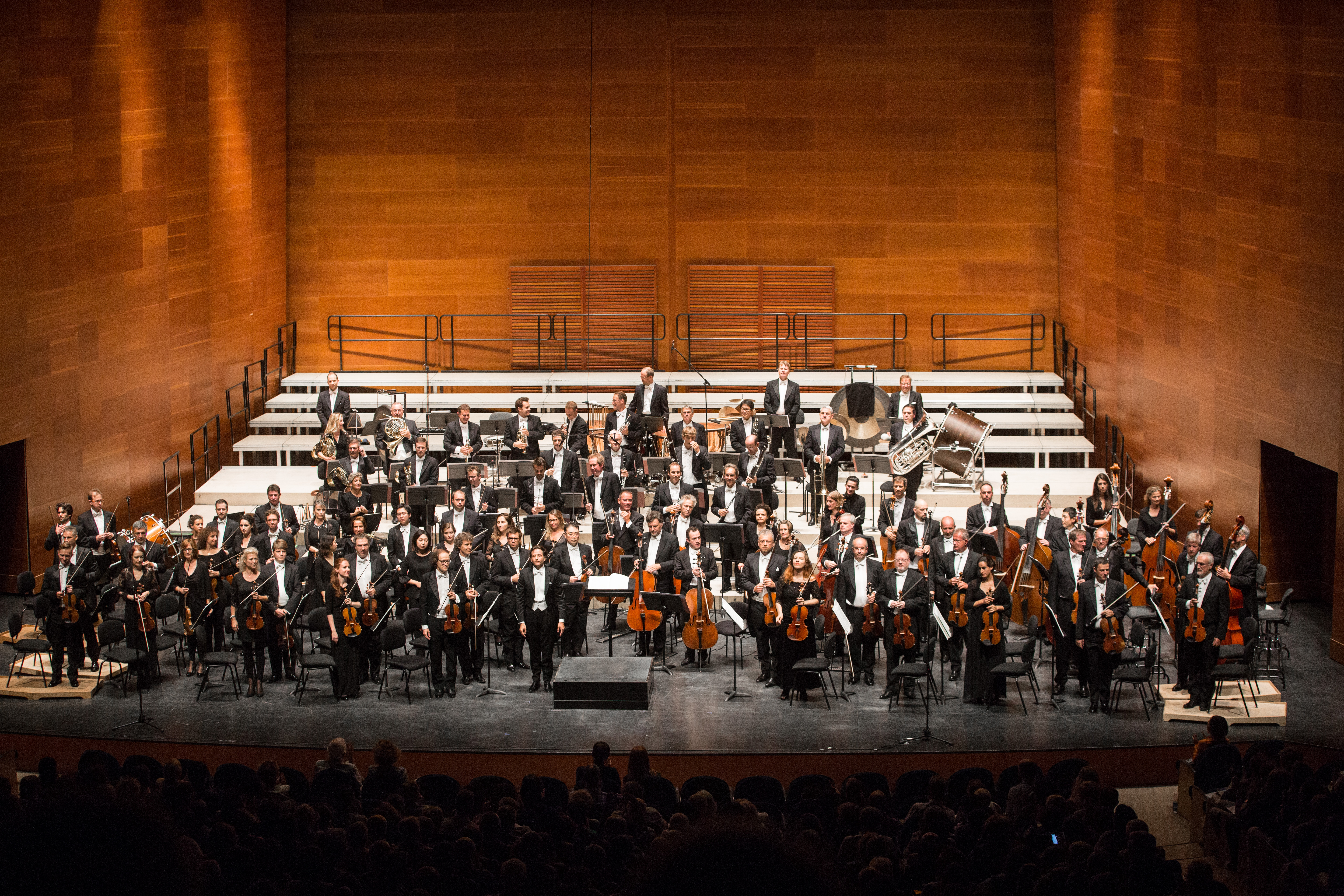 ©Quincena Musical-Iñigo Ibáñez